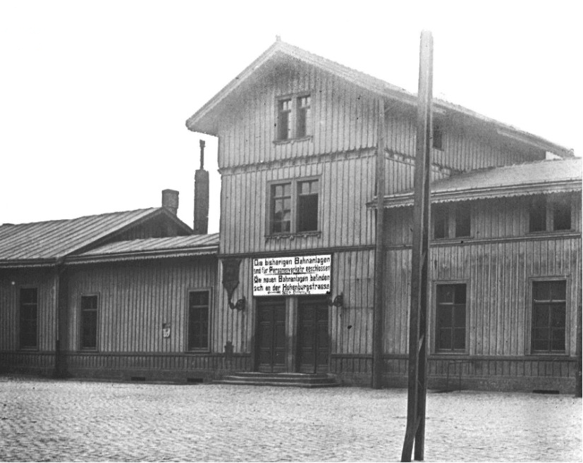 Essen, Alter Bahnhof, 1900